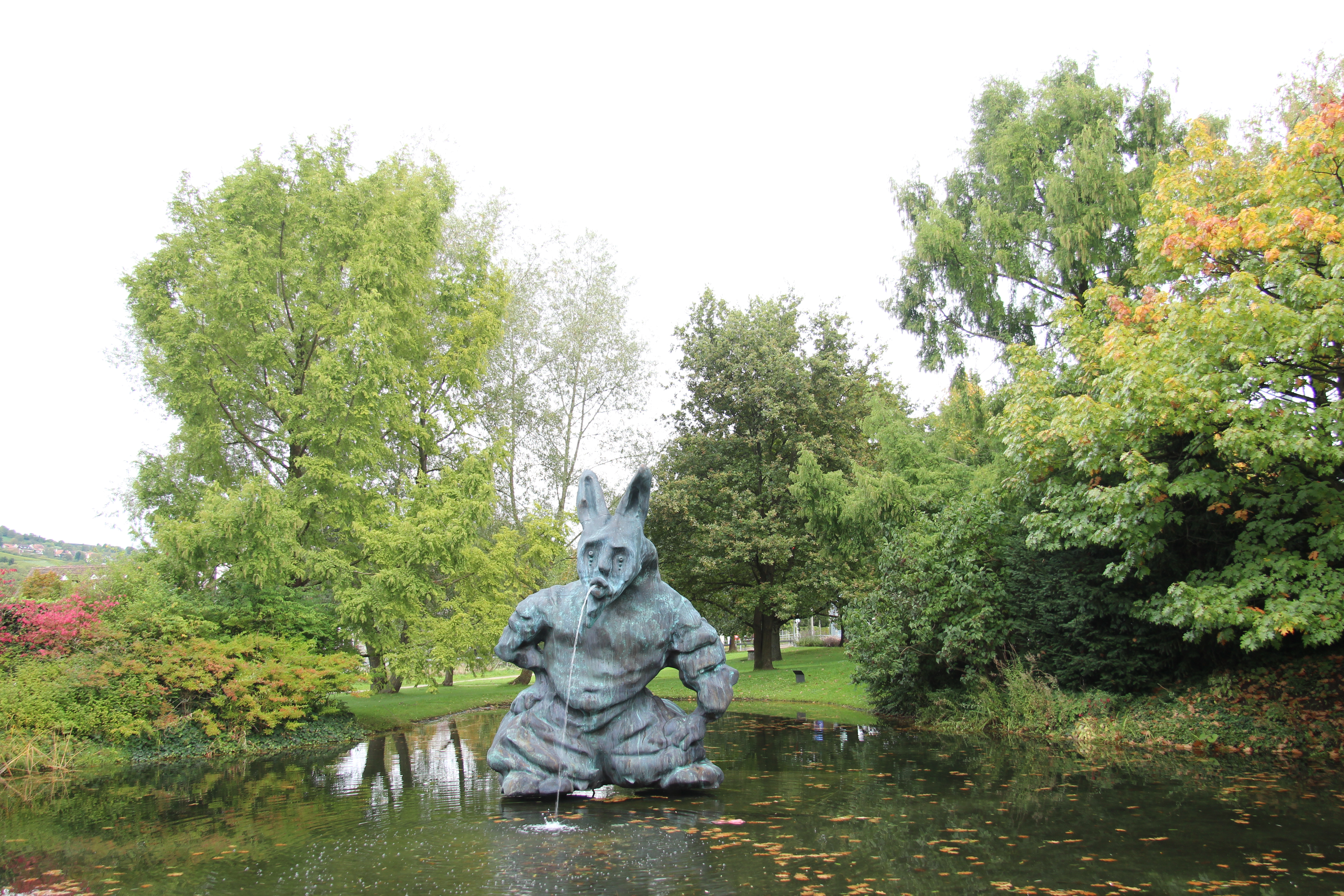 Thomas Schütte - Hase (2013 ) tijdens de expositie in 2013 in Fondation Beyeler, Riehen (bij Basel), Zwitserland.